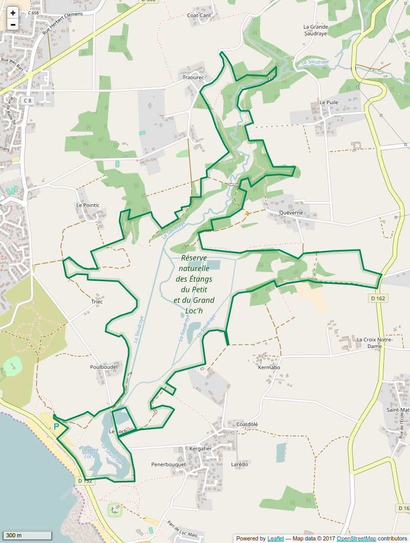 Périmètre de la RNR des Etangs du petit et du grand Loc'h.